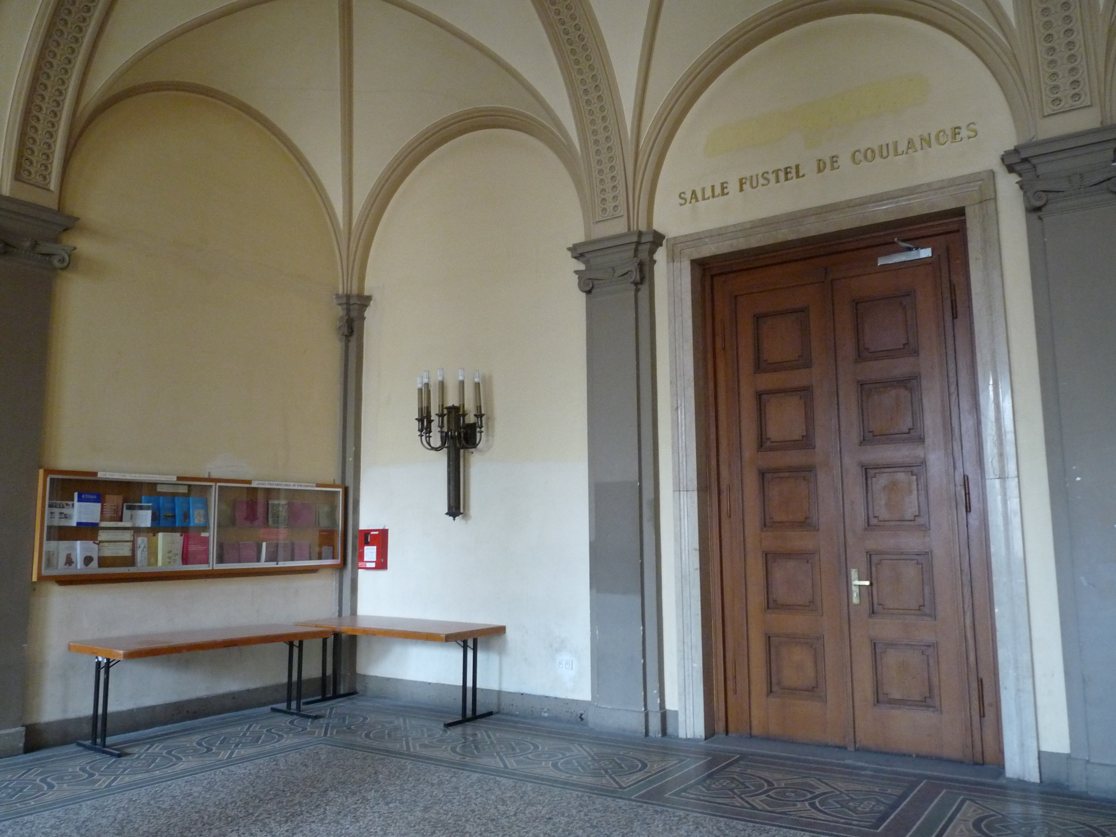 Palais Universitaire de Strasbourg, premier étage : entrée de la salle Fustel de Coulanges, où ont lieu soutenances de thèses et cérémonies